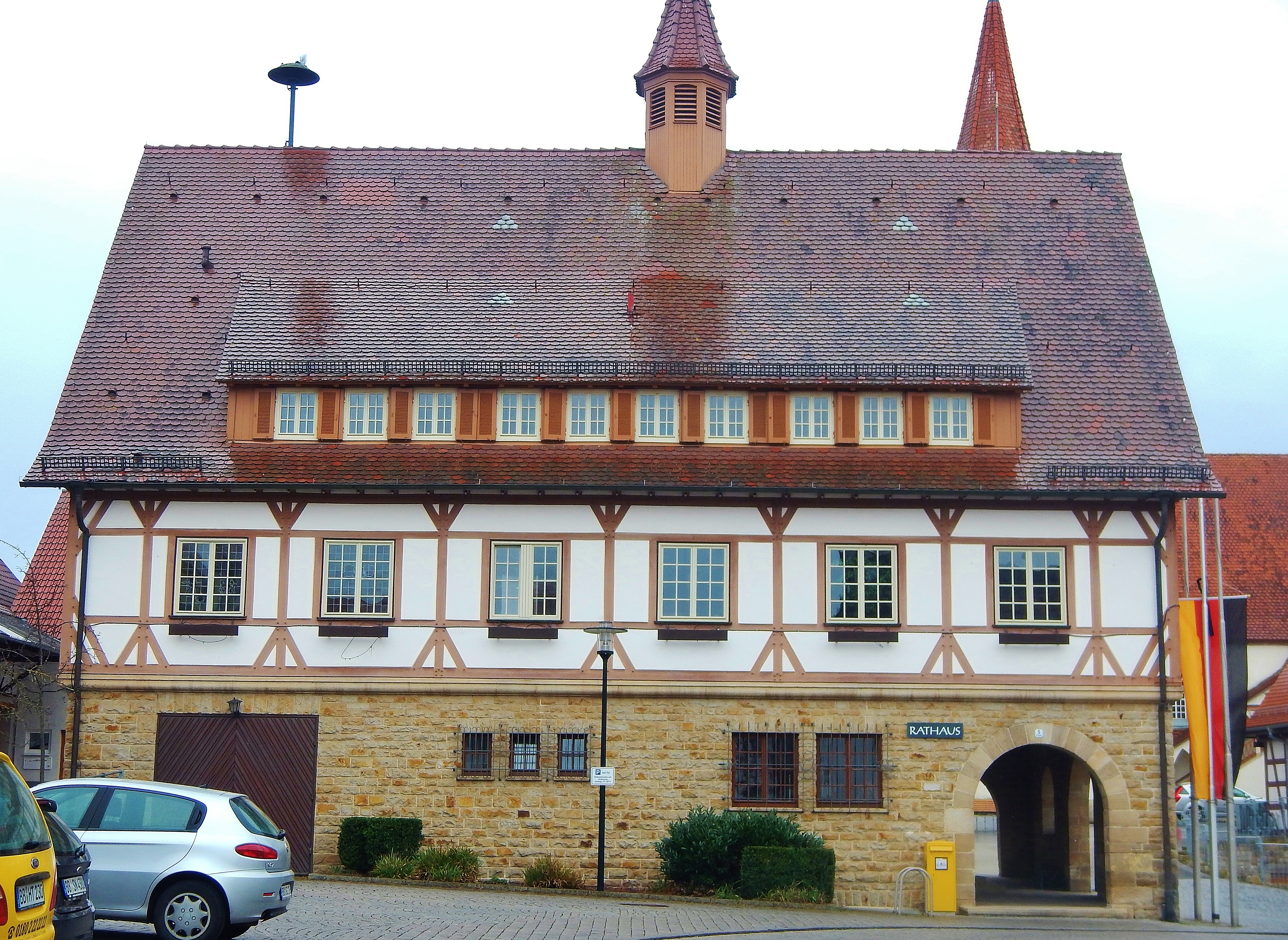 Rathaus in Altdorf, Kreis Böblingen.